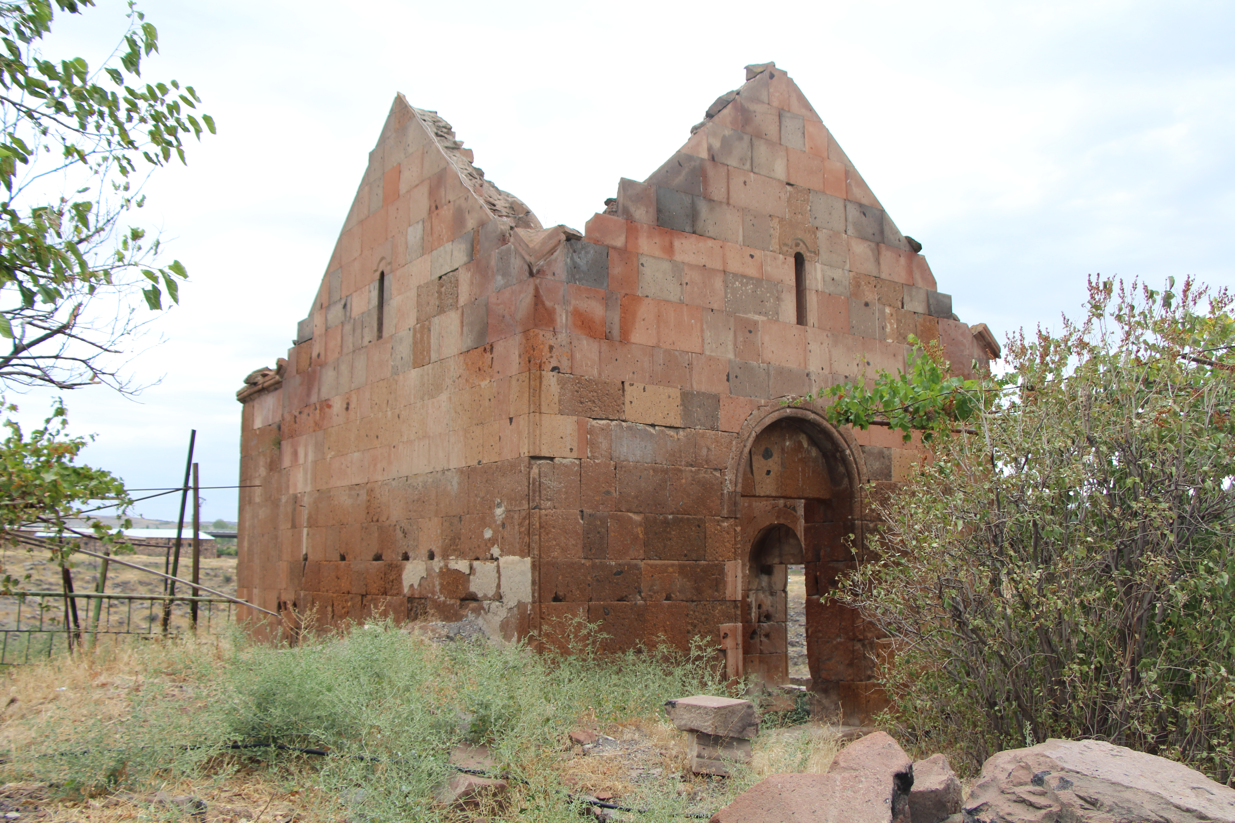 Աշտարակ, Արագածոտնի մարզ, ԵԿԵՂԵՑԻ ՍՊԻՏԱԿԱՎՈՐ 13 դ. ք.մ., Բերդաթաղում 2.1/19 կիրճի եզրին, կիսավեր 1/19